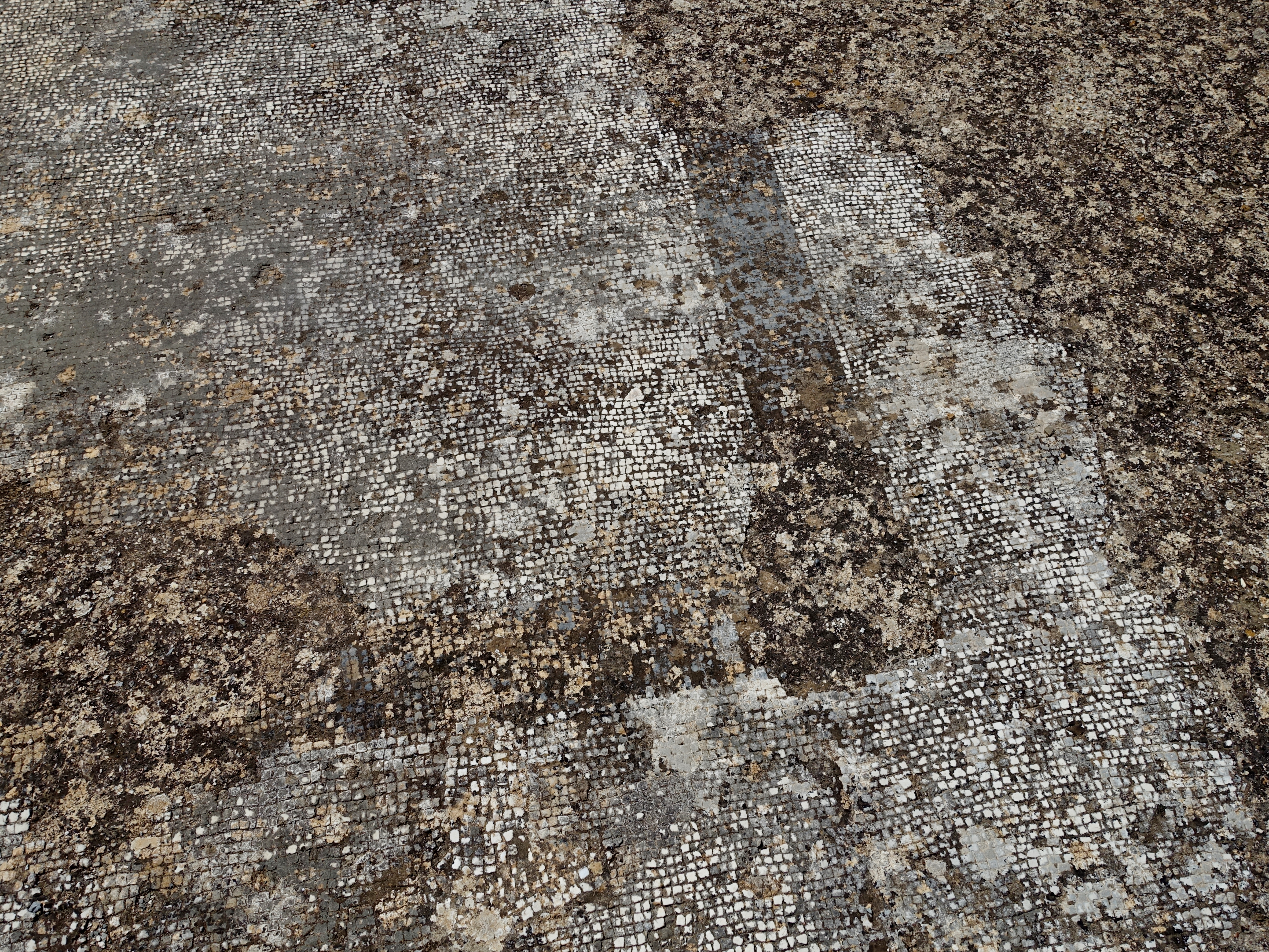 Römischer Tempel von Antas (Tempio di Antas), Gemeinde Fluminimaggiore, Sardinien, Italien